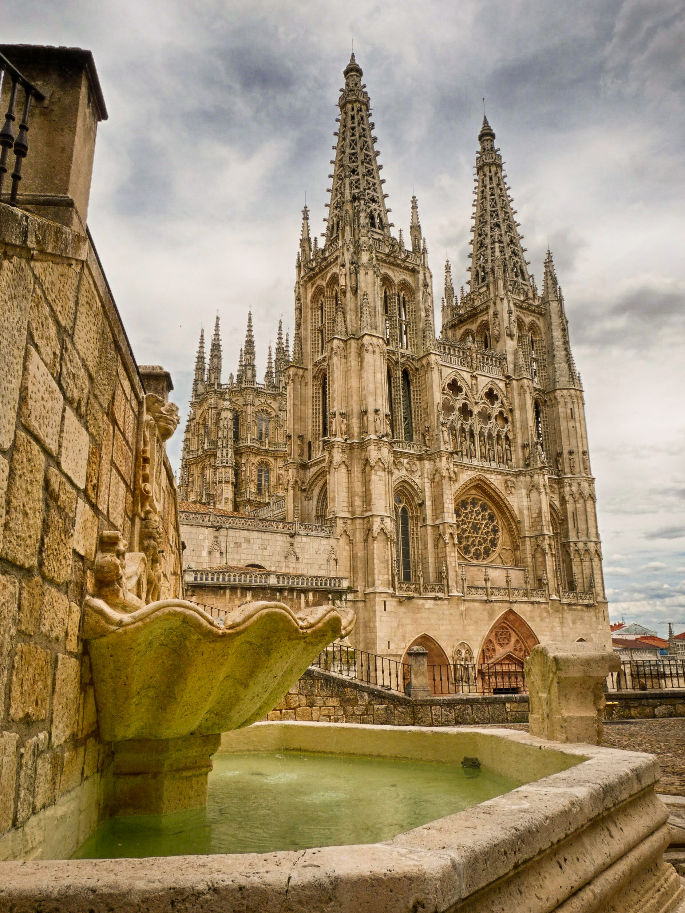 Fachada principal de la Catedral de Burgos